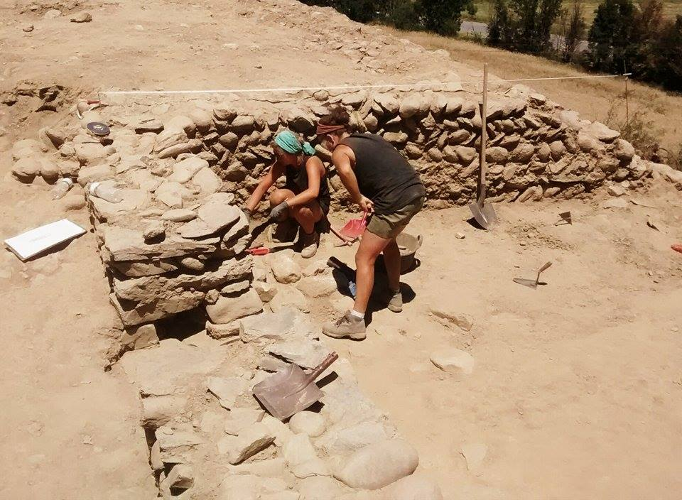 Jaciment Arqueològic del Castellot amb voluntaris de la Universitat Autònoma de Barcelona realitzant una campanya d'excavació.